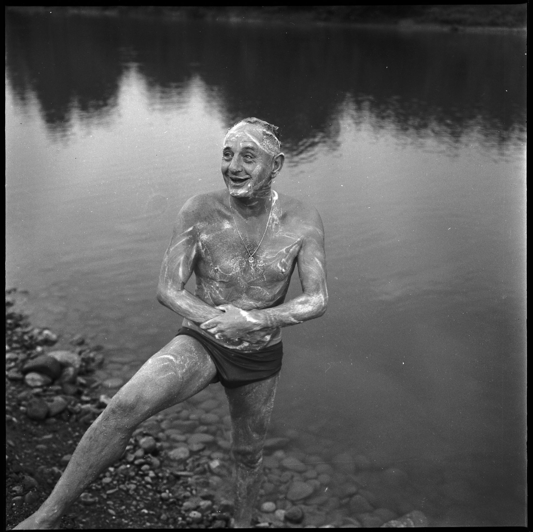 Lacroix-Falgarde (Haute-Garonne). 30 Août 1966. Vue du Colonel Bigeard en train de faire sa toilette au bord d'une rivière.